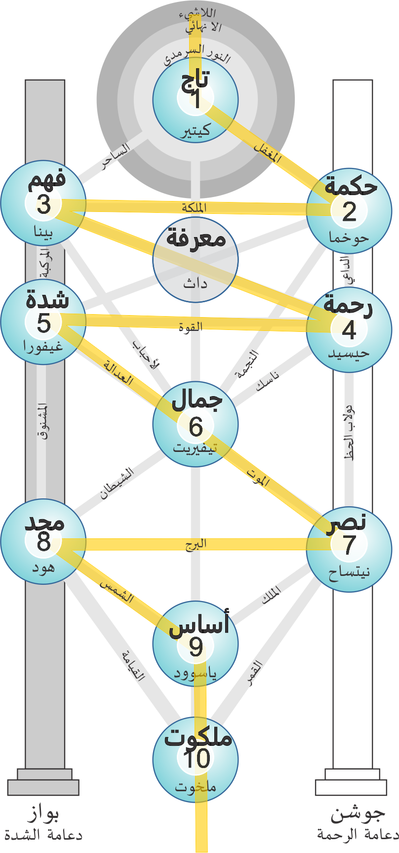 شجرة الحياة مع وصف لكل من السفيروت بالعربية